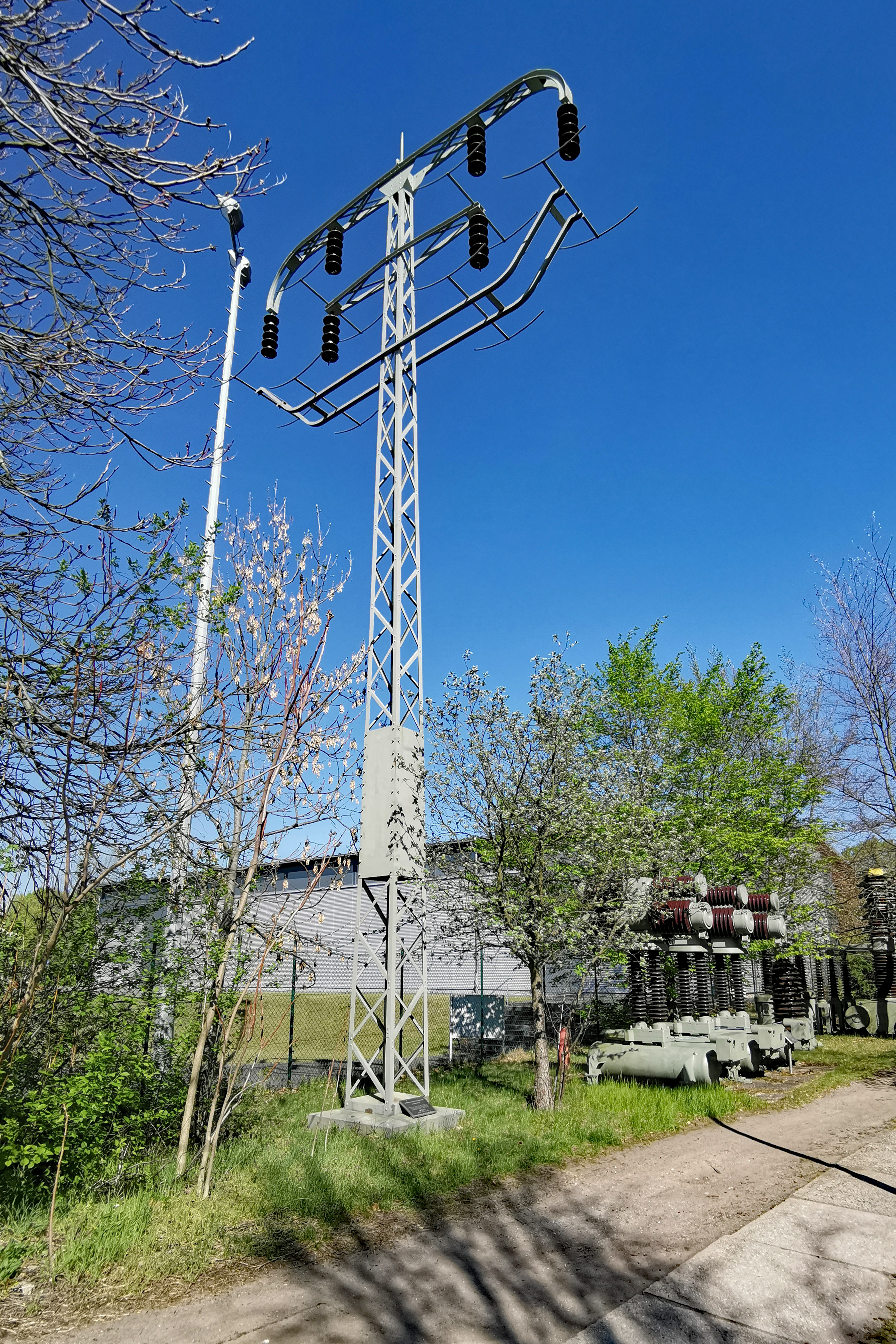 Historischer Stahlgittermast der 110 kV-Leitung Lauchhammer-Riesa (BTU Cottbus, Brandenburg, Deutschland)